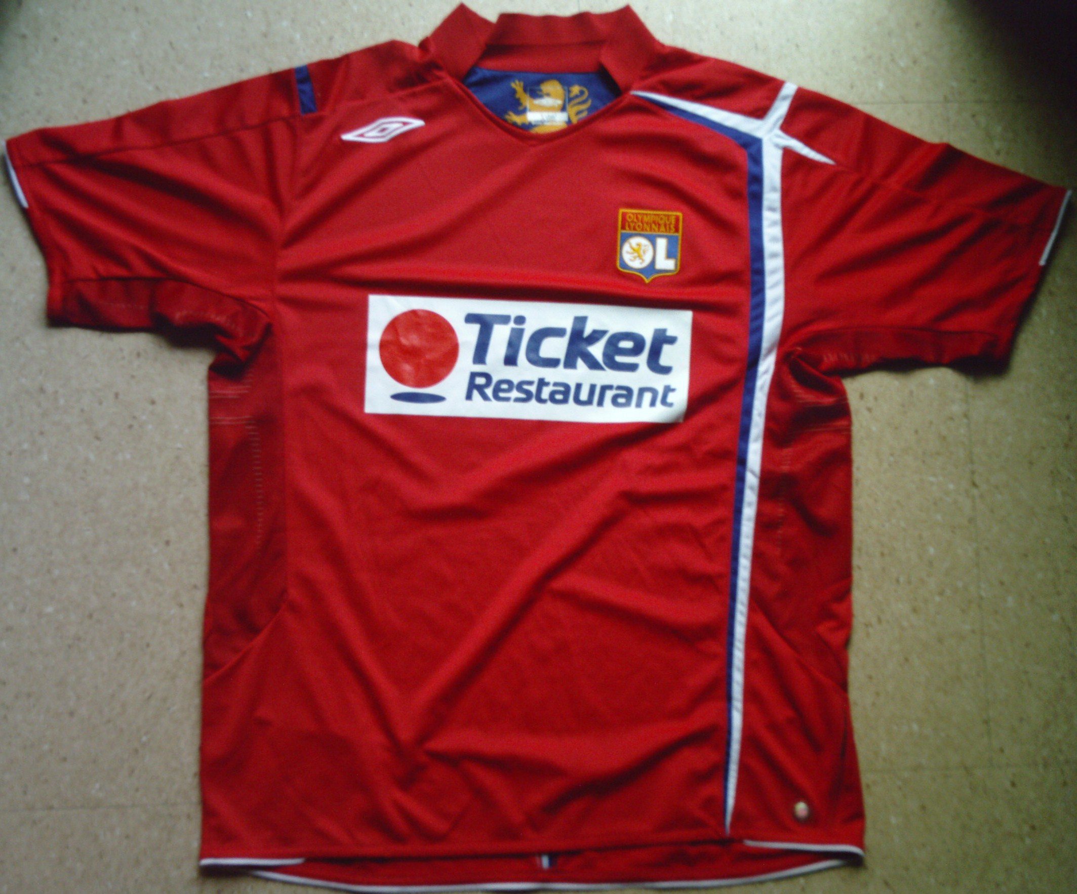 Maillot "away" de l'Olympique lyonnais pour la saison 2006-2007